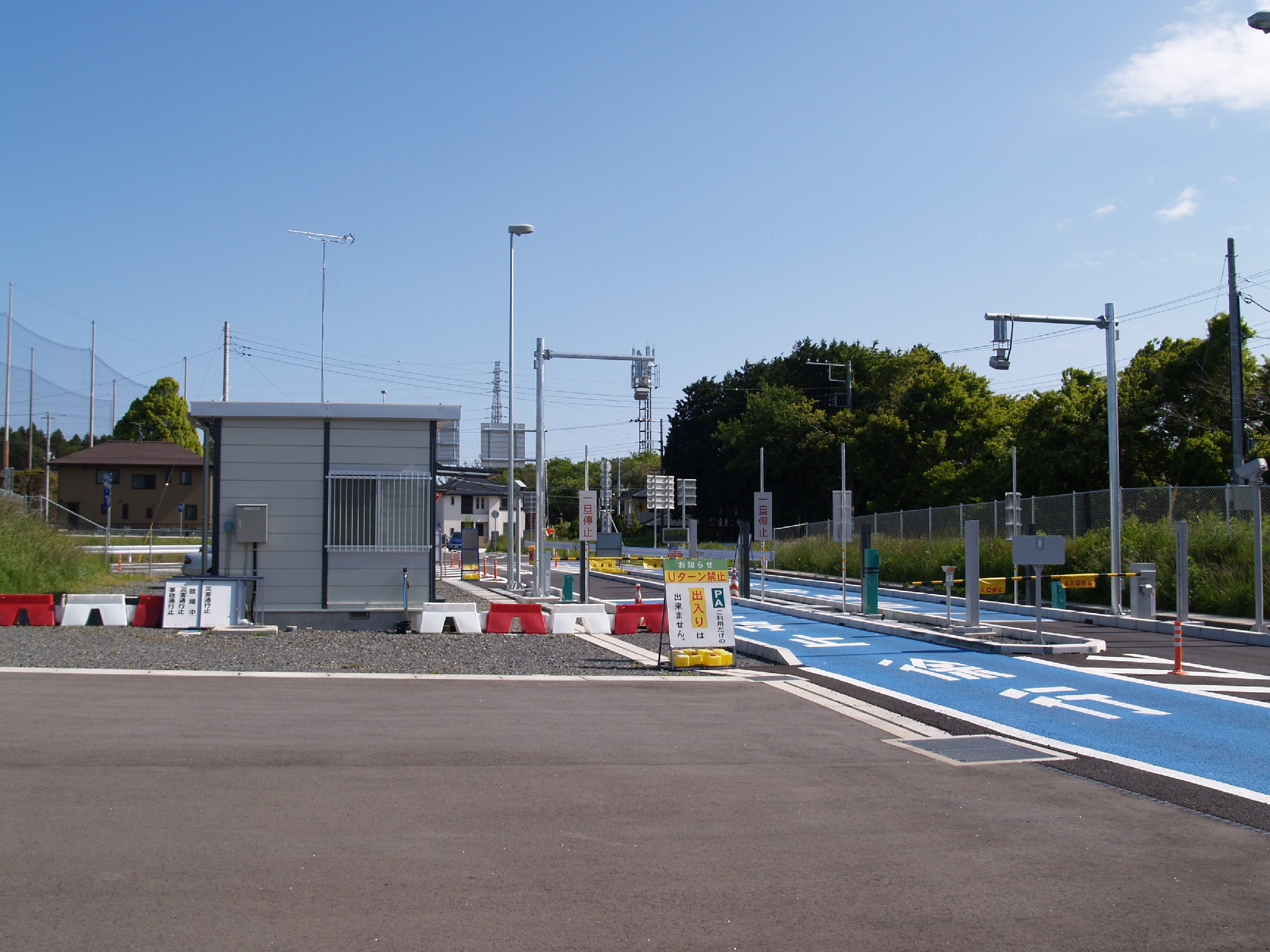 東海パーキングエリアに併設されているスマートインターチェンジ（上り線）。パーキングエリア内より撮影。